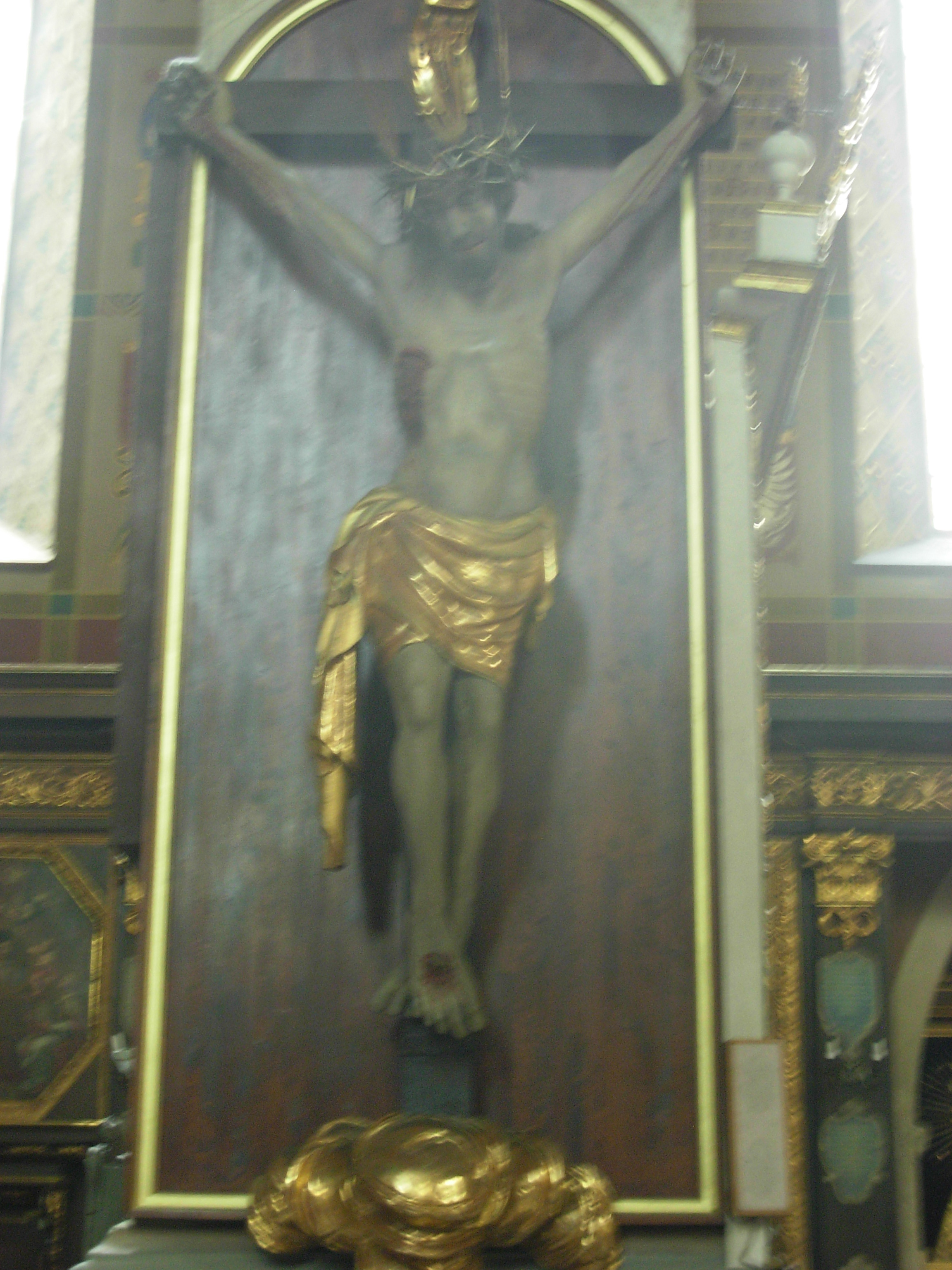 Sandomierz Cathedrali Sandomierz, Poland.